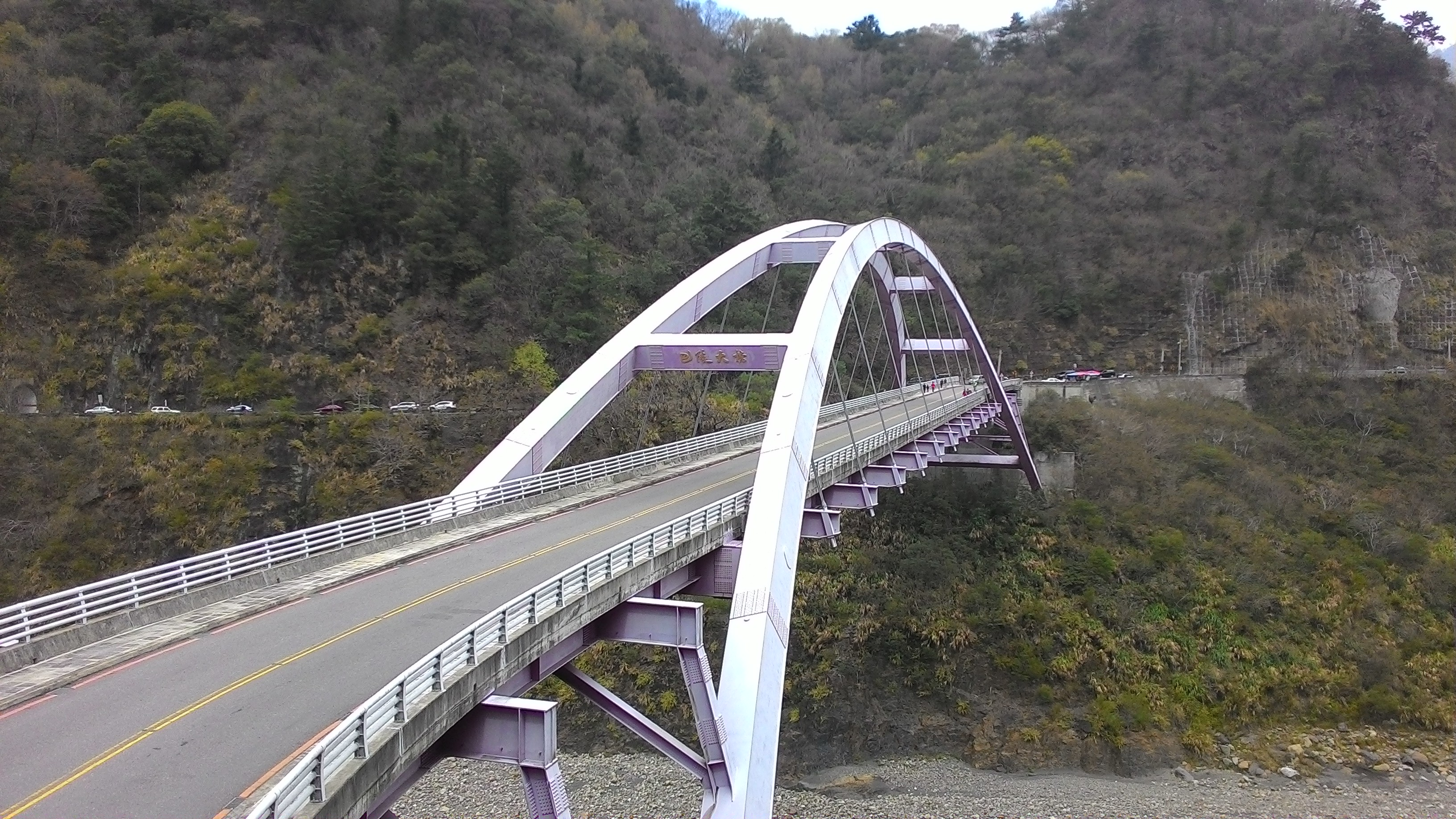 中文（台灣）: 北橫巴陵大橋